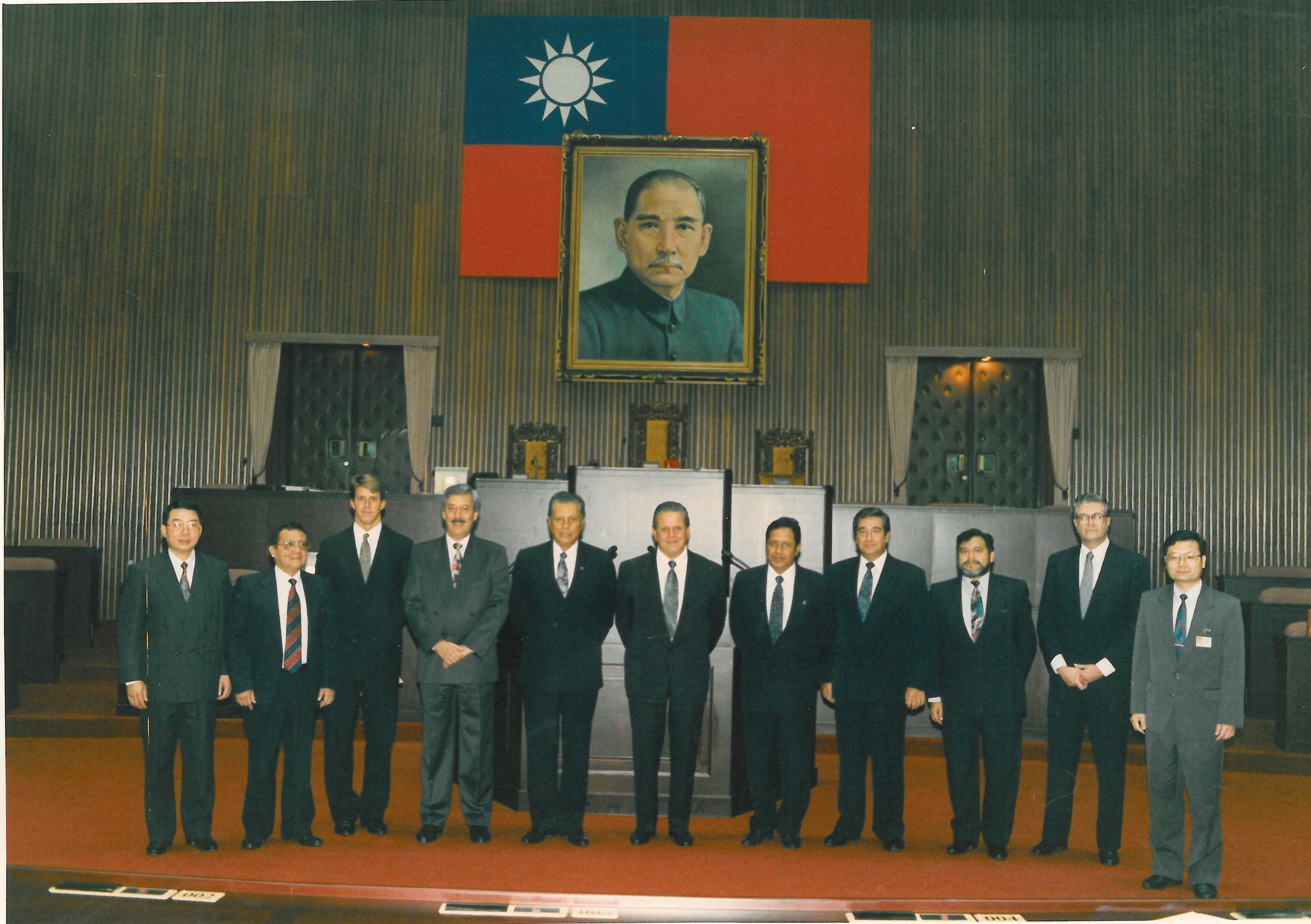 Durante una gira a Asia Justo German Escalante Bolanos